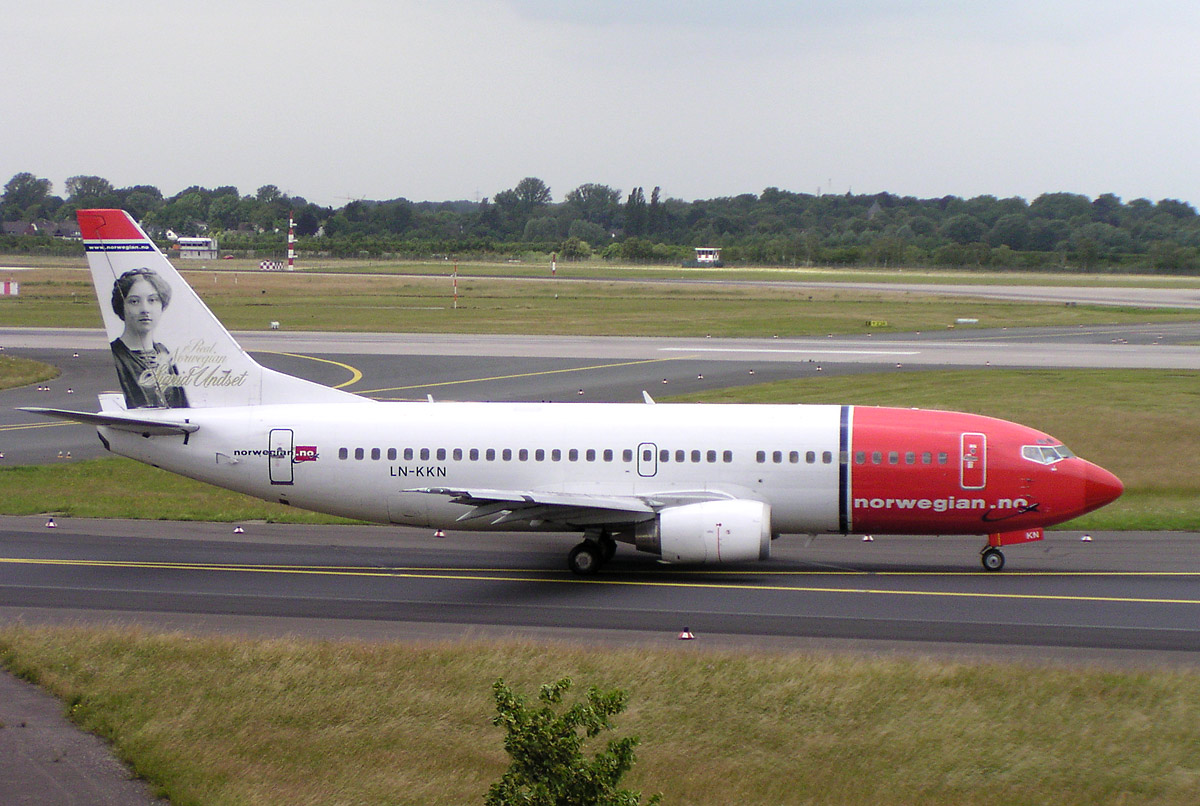 Norwegian Air Shuttle B737-300 LN-KKN Sigrid Undset in Düsseldorf (DUS/EDDL)